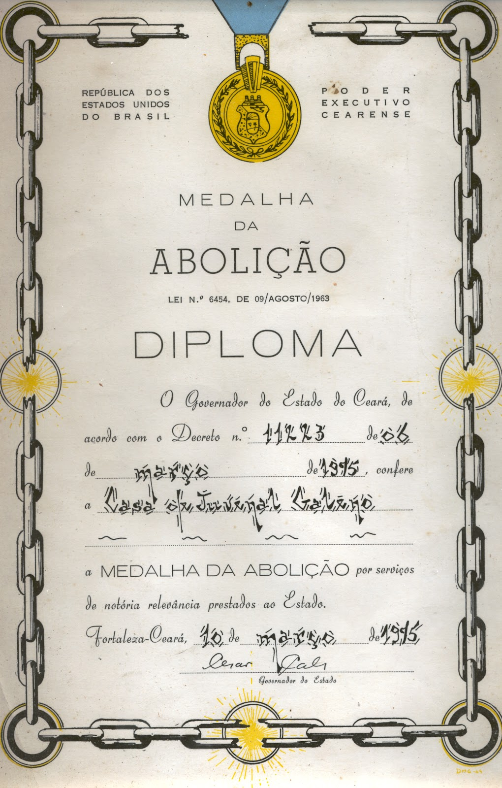 Diploma da Medalha da Abolição, uma honraria do Governo do Estado do Ceará.